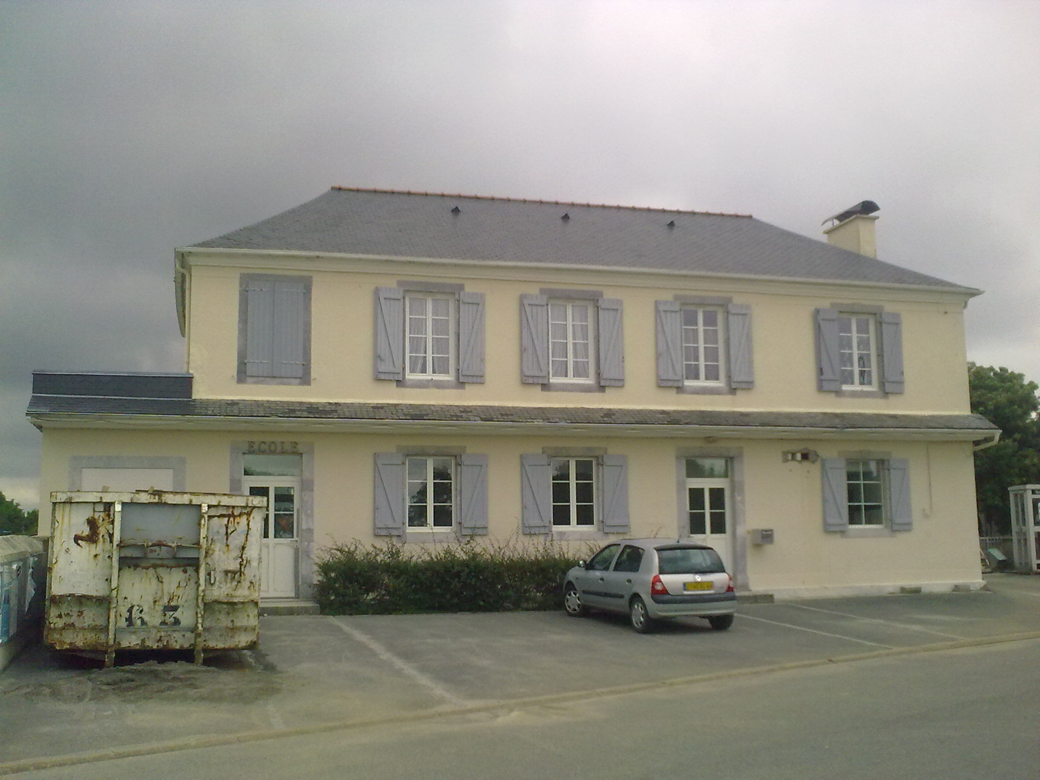 Limendous